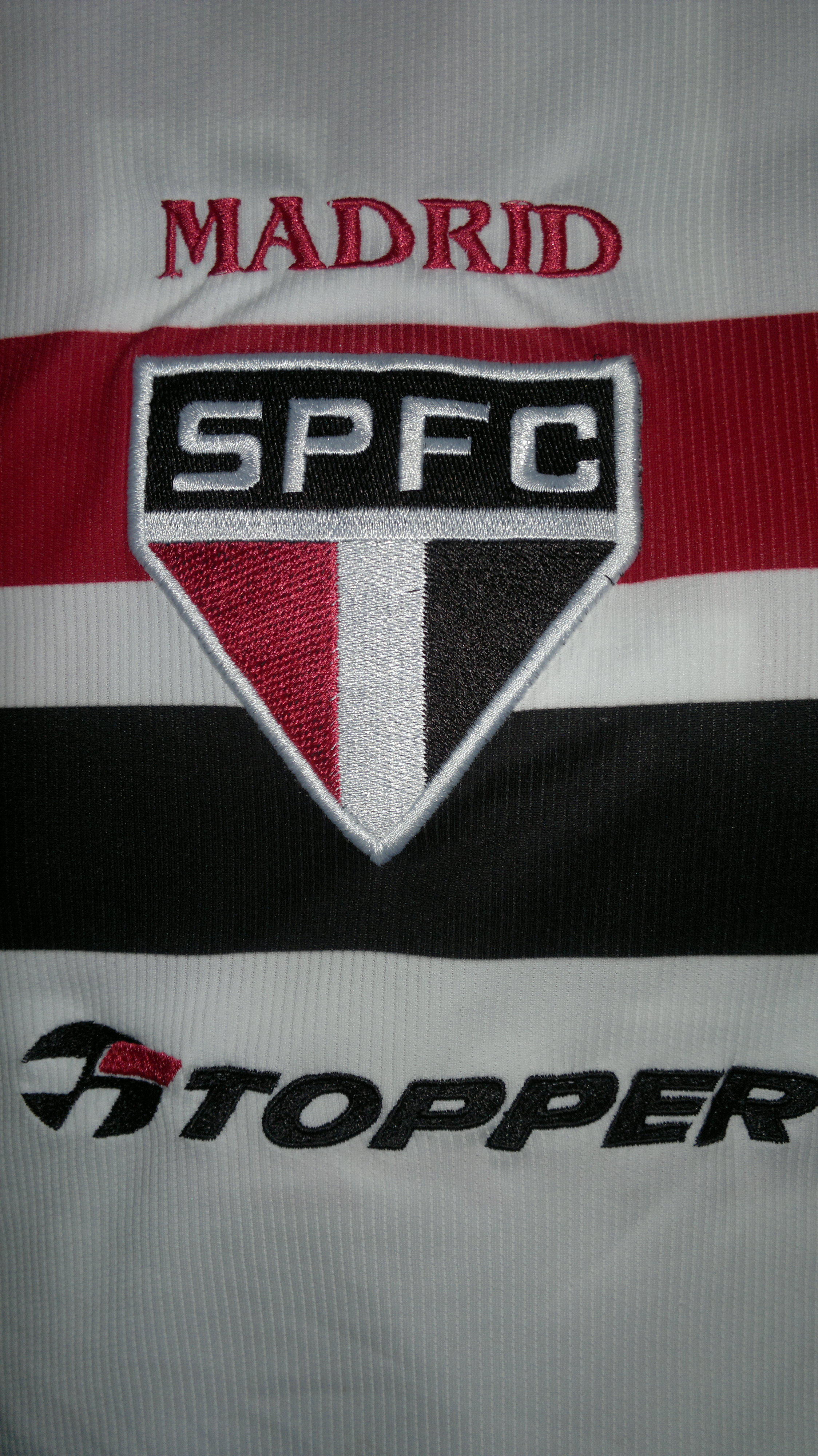 Escudo Sao Paulo Madrid